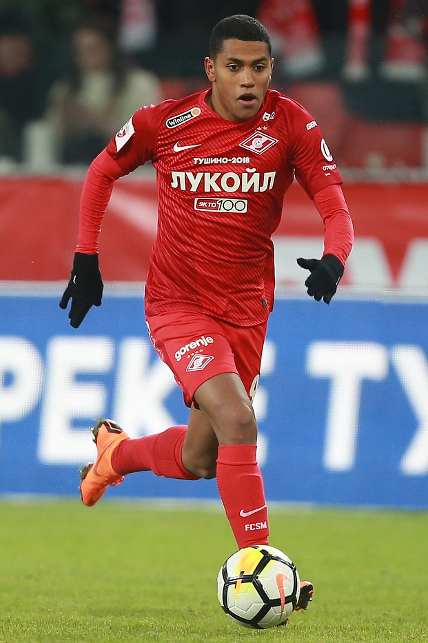 «Спартак» вырвал победу над хабаровским СКА